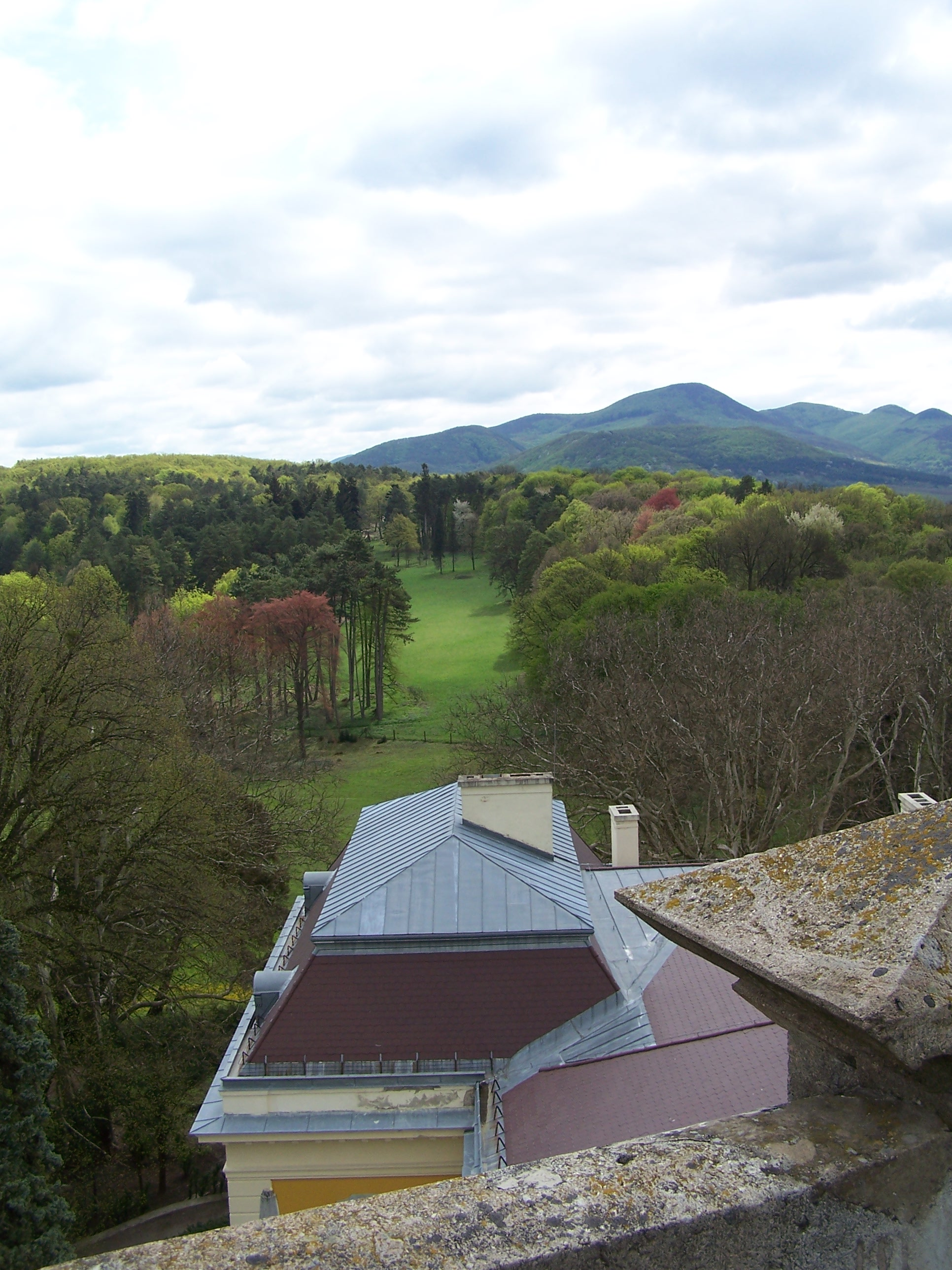 A füzérradványi Károlyi-kastély teteje és parkja This is a photo of a monument in Hungary. Identifier: 2768